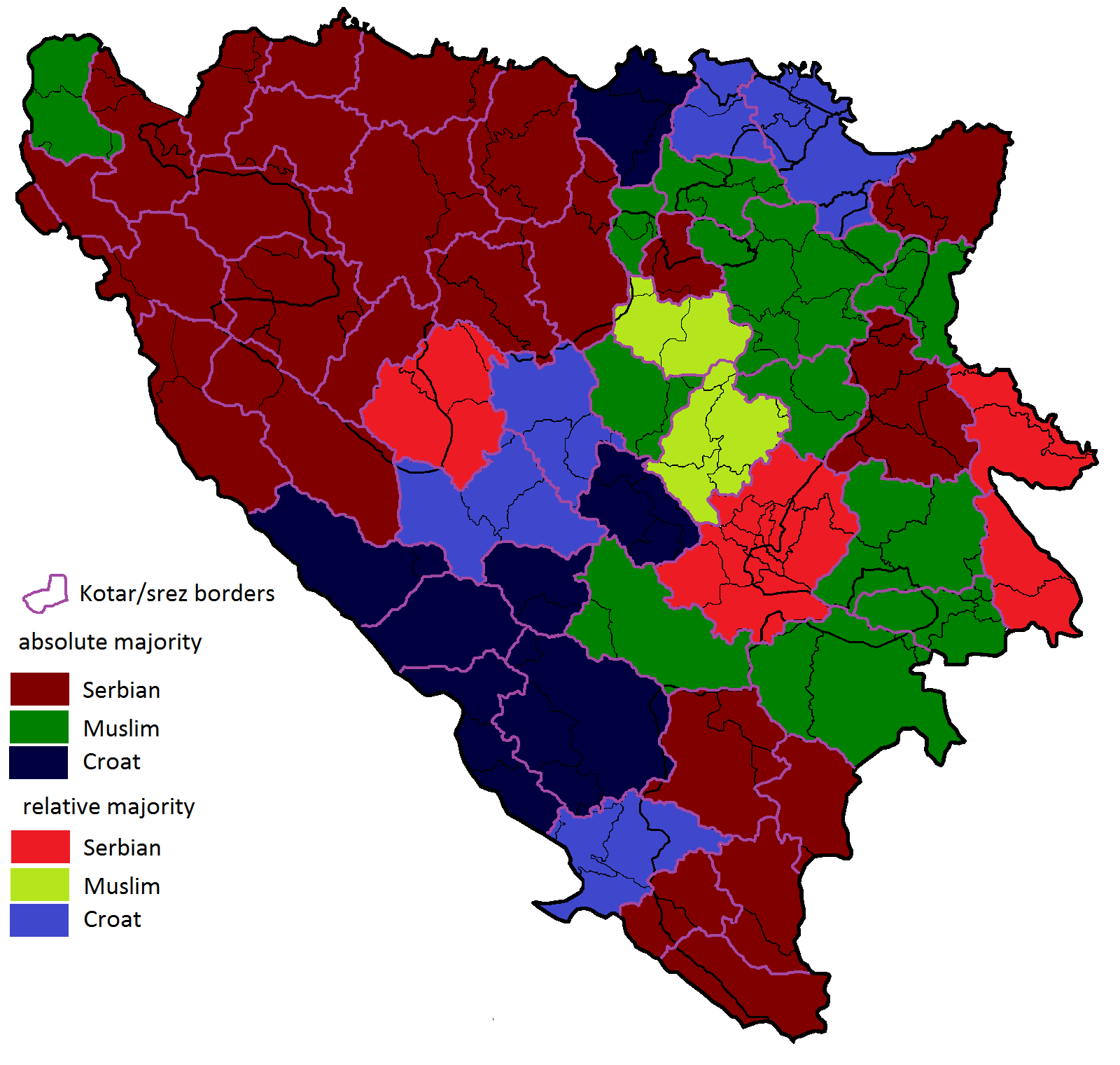 Pučanstvo u BiH po popisu iz 1931.